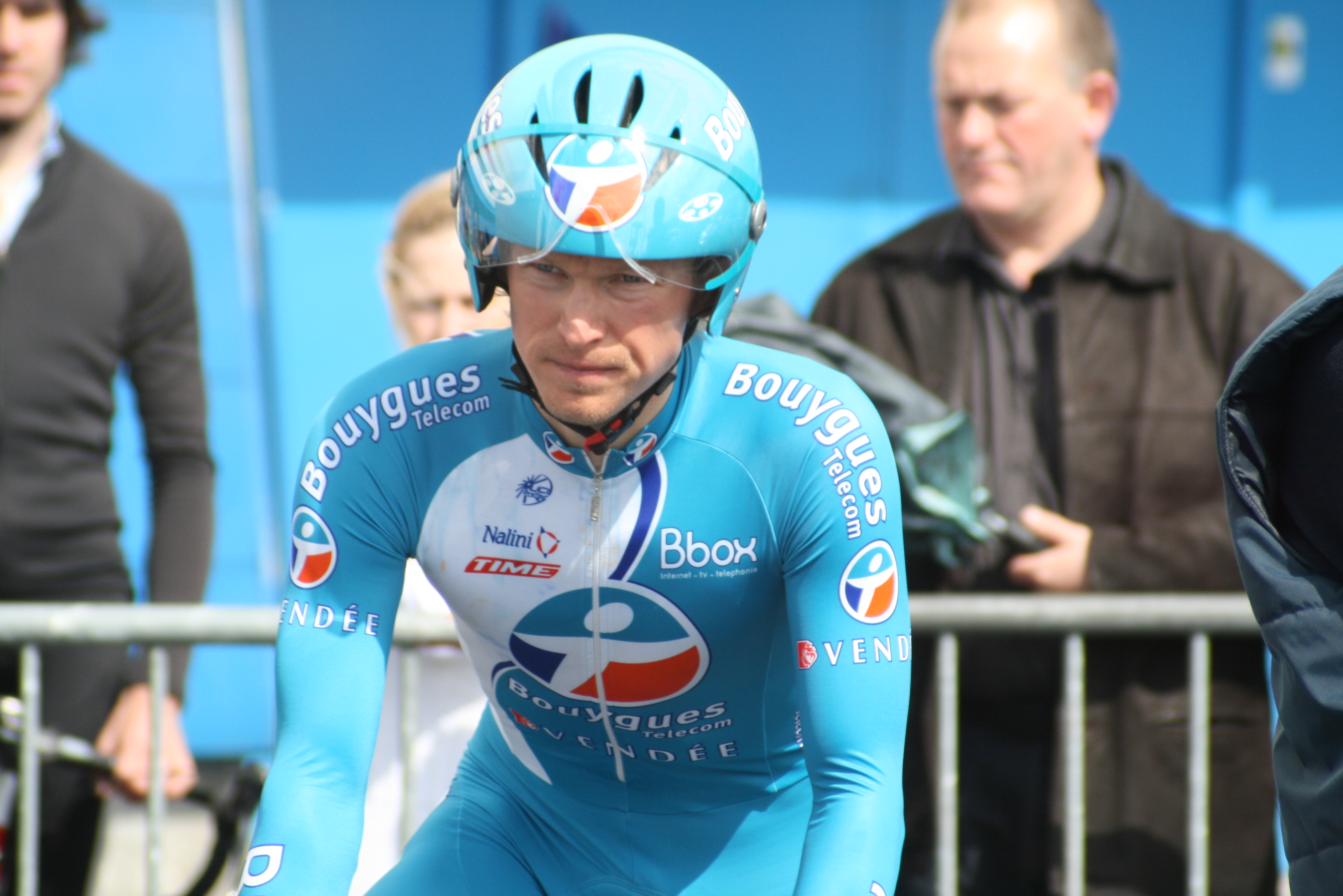 Yuri Trofimov, durant les Quatre jours de Dunkerque 2009, à Douai